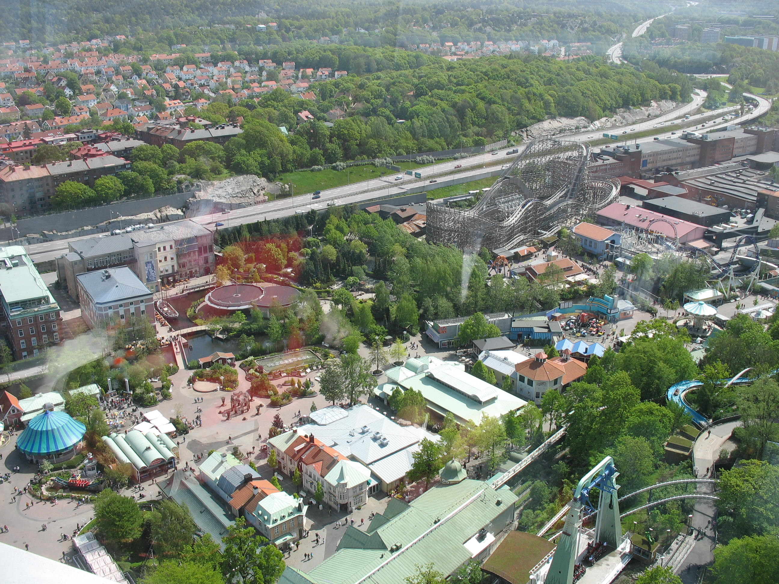 Utsikt över Liseberg